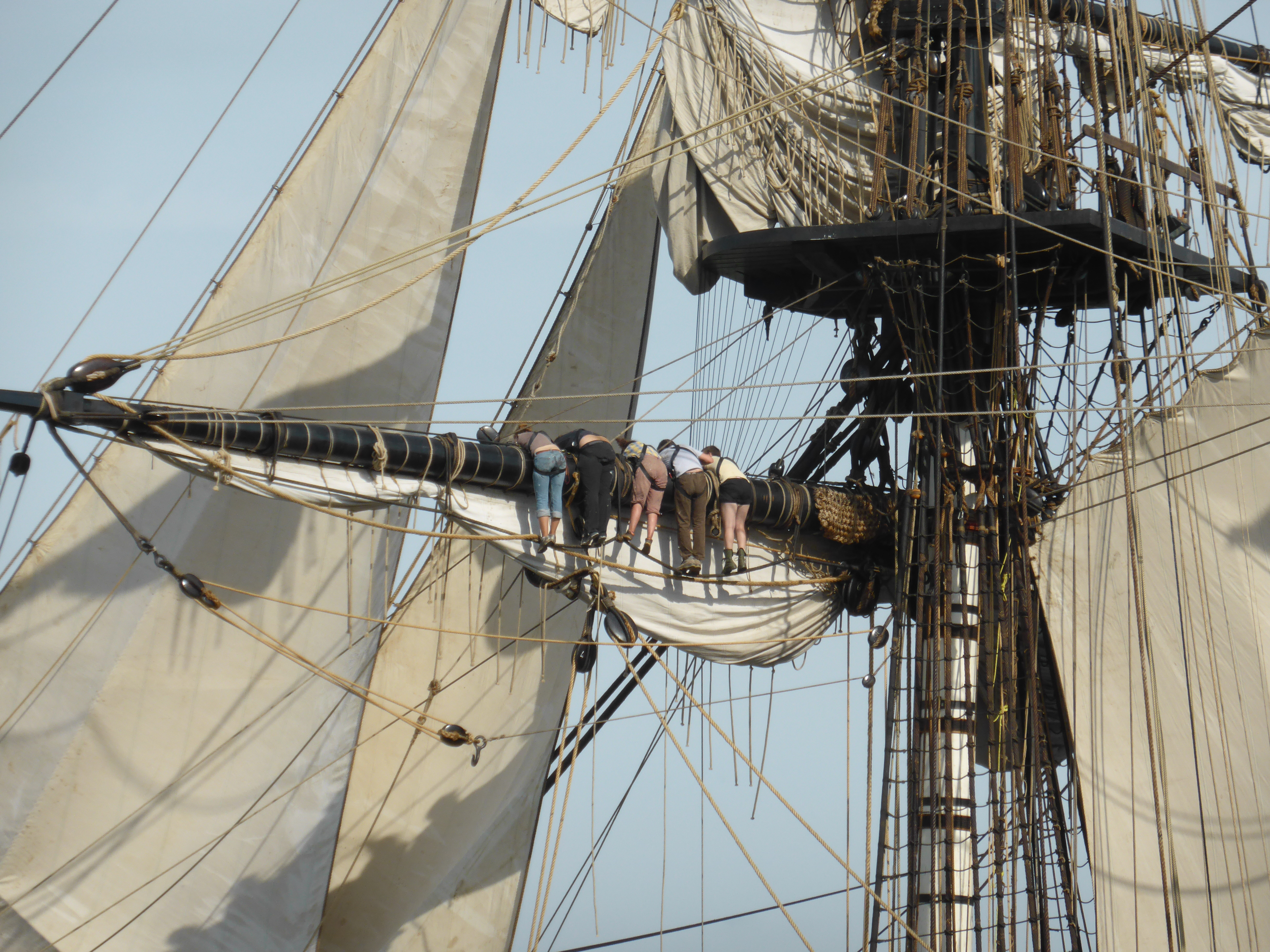 On range les voiles sur le bateau musée Hermione à Rochefort